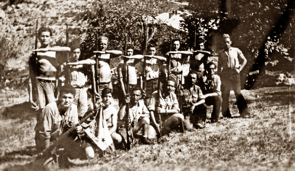 Maquis FTP à Châteauneuf-de-Bordette, 1944